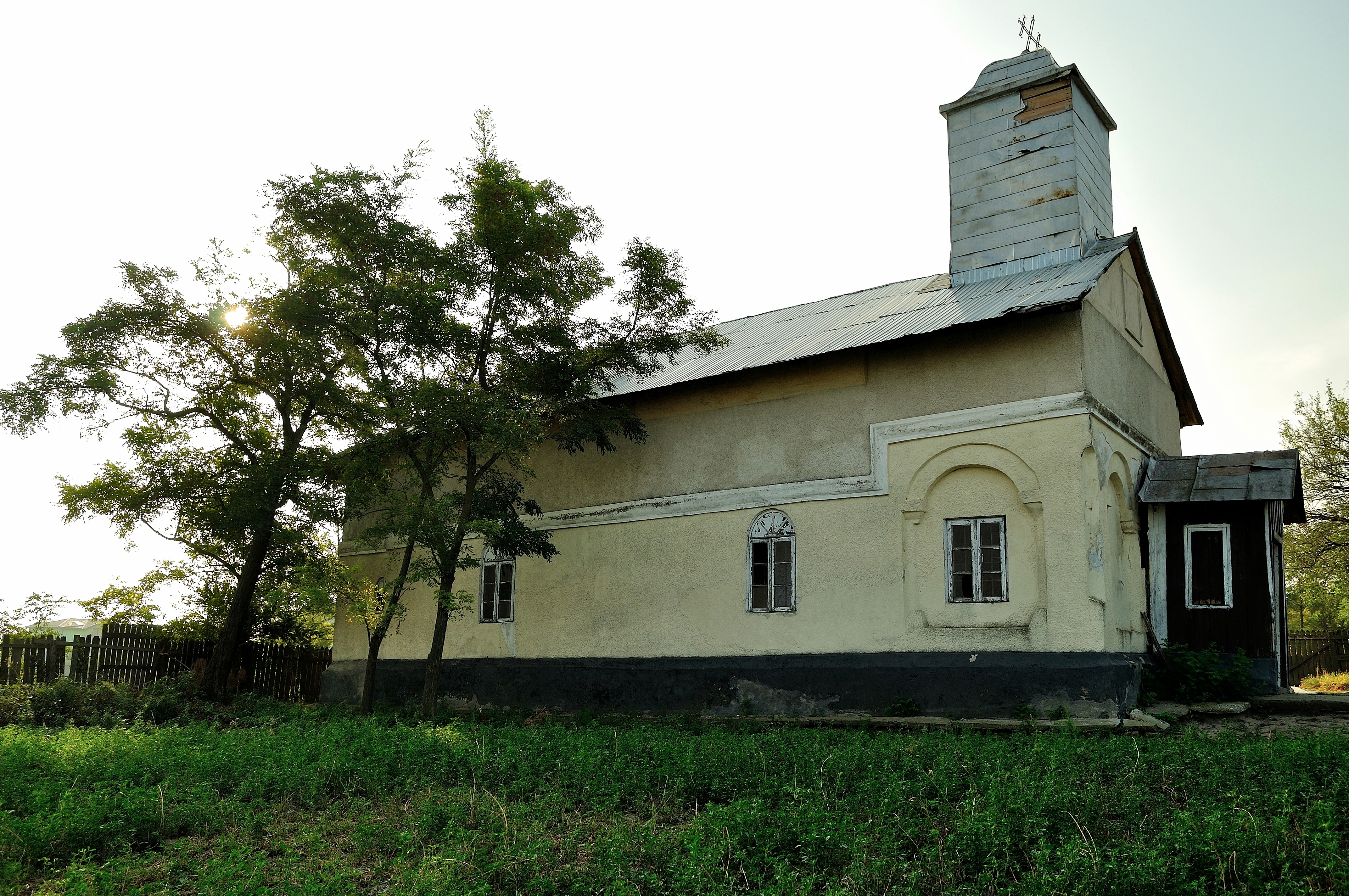 Biserica „Sf. 40 de Mucenici”